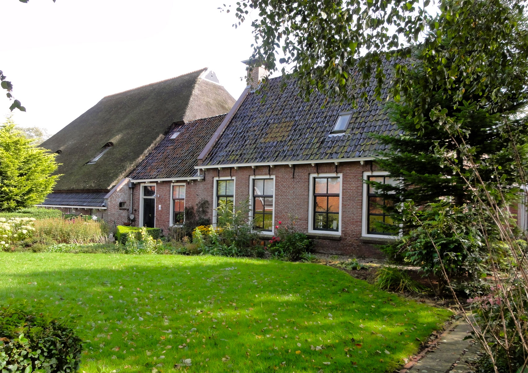 Unia zathe, Omgong 7 en 8 in Ee